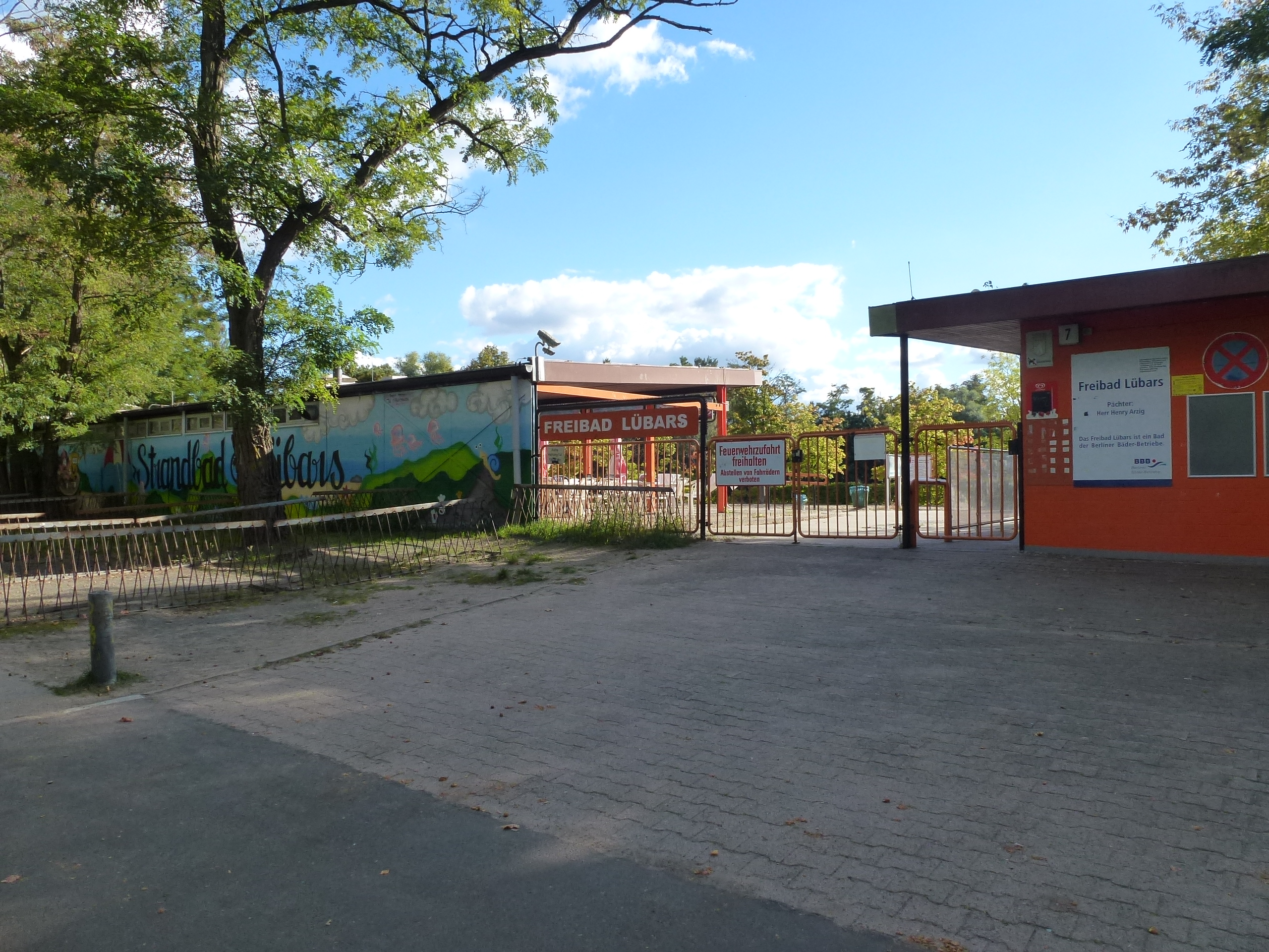 Berlin-Lübars Freibad Lübars am Ziegeleisee